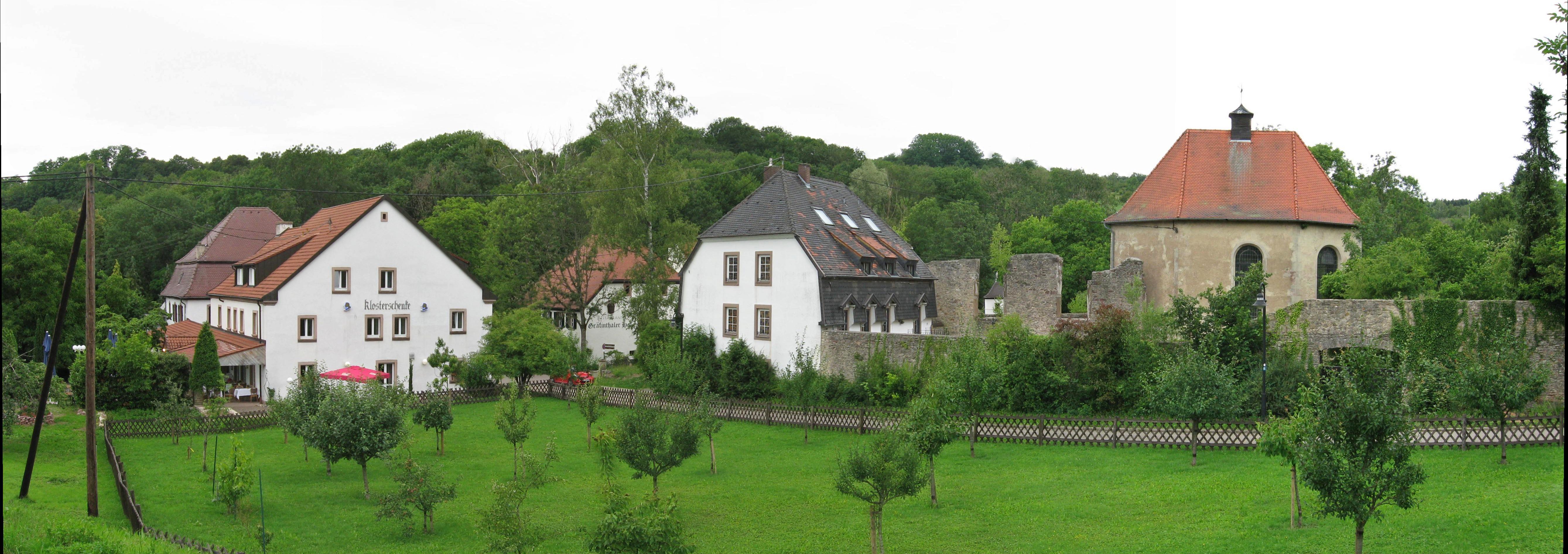 Blick über das Ensemble